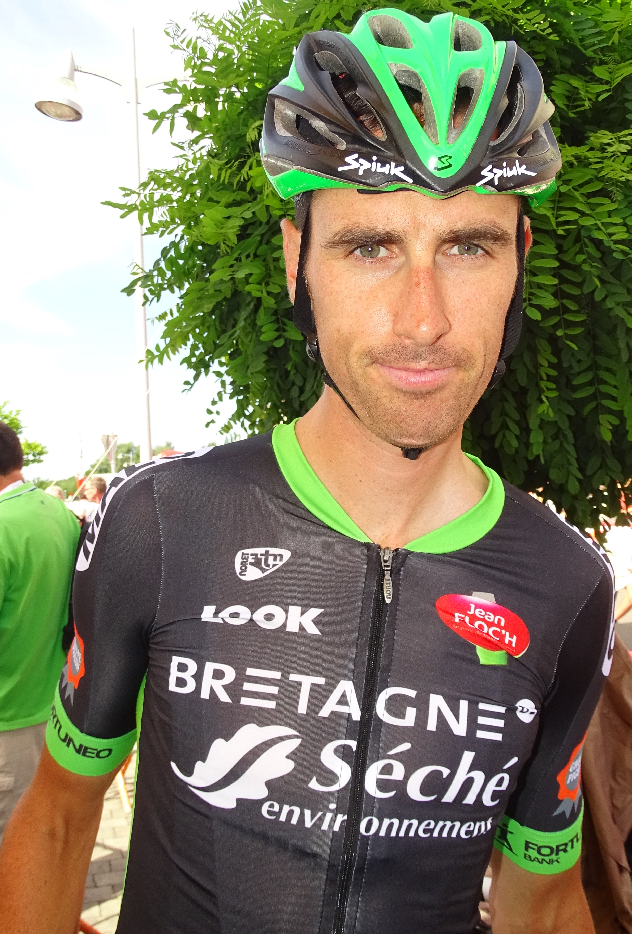 Reportage réalisé le mercredi 22 juillet à l'occasion du départ du Grand Prix Pino Cerami 2015 à Saint-Ghislain, Belgique.